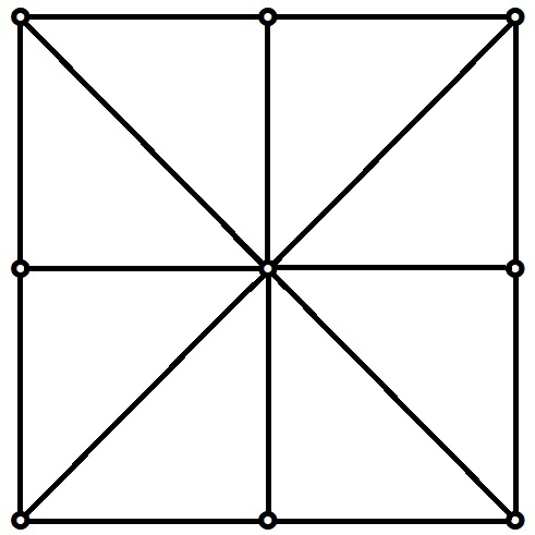 Igra sa 3 figure